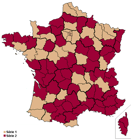 Carte des départements dans lesquels sont élus les deux séries de membres du Sénat français.